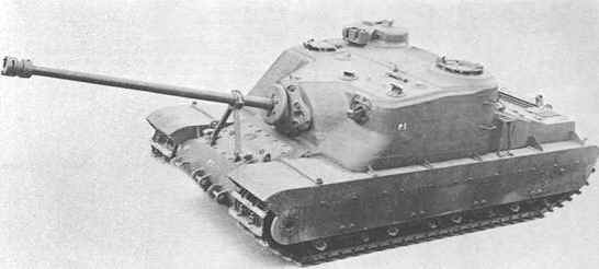 Schwerer Sturmpanzer/Jagdpanzer A39 Tortoise (Werksfoto 1945) Aufnahme: Nuffield Mechanisations & Aero Ltd. / Großbritannien Die Firmenunterlagen (erloschen: 1952) befinden sich in der Bibliothek der Universität Warwick. Access Conditions: There are no restrictions on access to these papers.